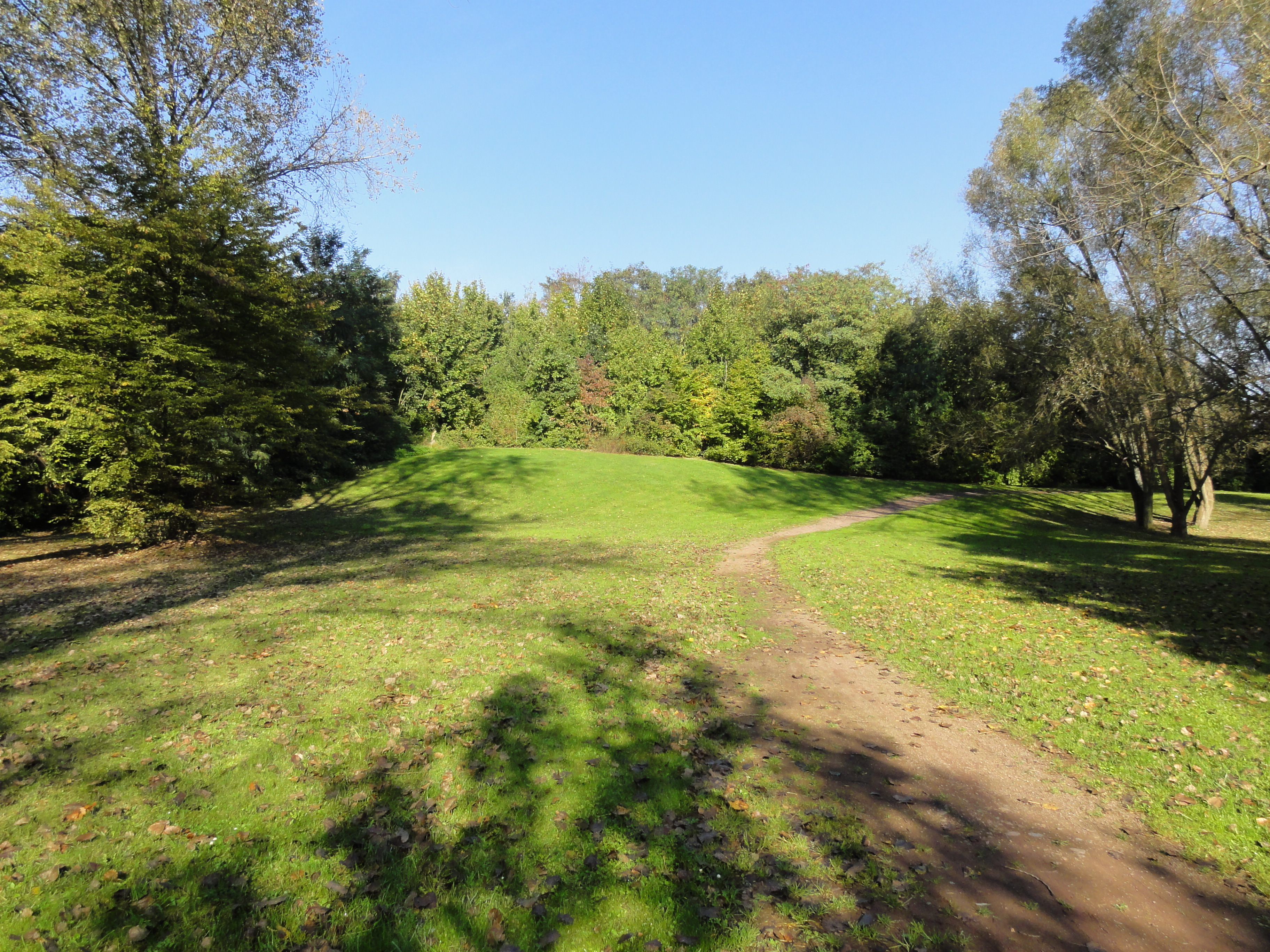 Terril n° 211 dit 3 d'Oignies, Fosse n° 3 de la Compagnie des mines d'Ostricourt, Libercourt, Pas-de-Calais, Nord-Pas-de-Calais, France.